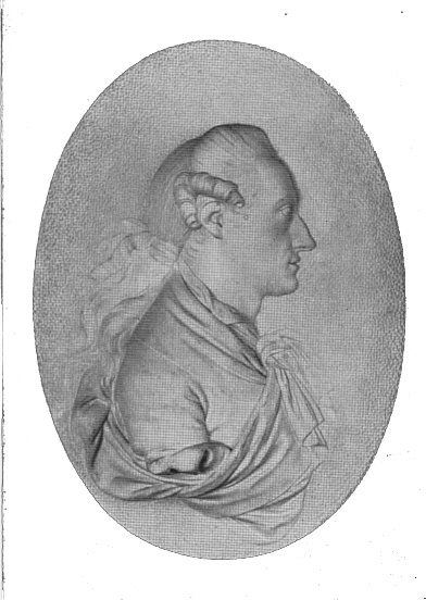 Johann Wolfgang von Goethe Das Relief von J .P .Melchior, 1775 in Biskuit ist das letzte Bildnis der vorweimarischen Zeit.